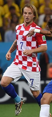 Ivan Rakitic